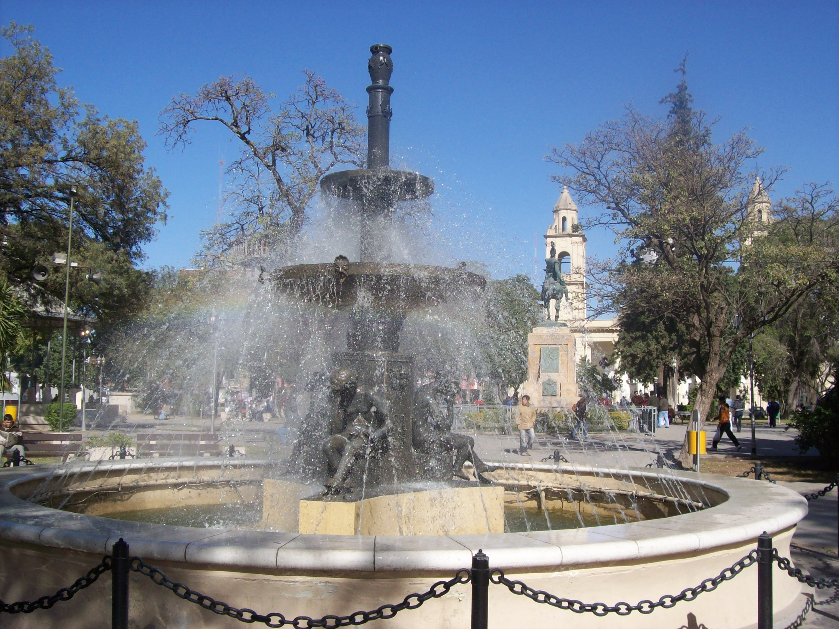 Plaza Libertad en la ciudad de Santiago del Estero, Argentina. Al fondo, el monumento a Belgrano y la iglesia catedral.